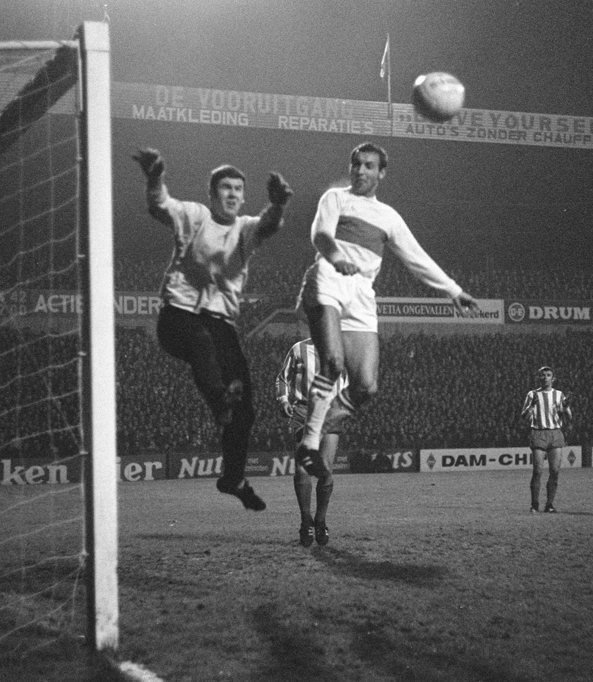 Collectie / Archief : Fotocollectie Anefo Reportage / Serie : [ onbekend ] Beschrijving : Europacup II , ADO-FC Koln 0-1 spelmomenten Datum : 12 november 1968 Trefwoorden : sport, voetbal Fotograaf : Koch, Eric / Anefo Auteursrechthebbende : Nationaal Archief Materiaalsoort : Negatief (zwart/wit) Nummer archiefinventaris : bekijk toegang 2.24.01.05 Bestanddeelnummer : 921-8492